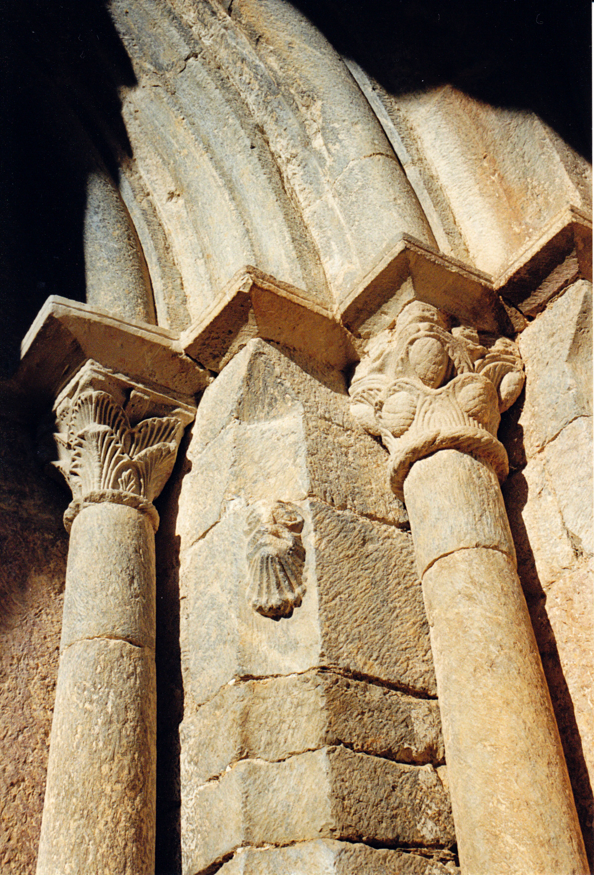 Espagne - Catalogne - Basse-Cerdagne - Isòvol - Église Saint-Pierre d'Olopte